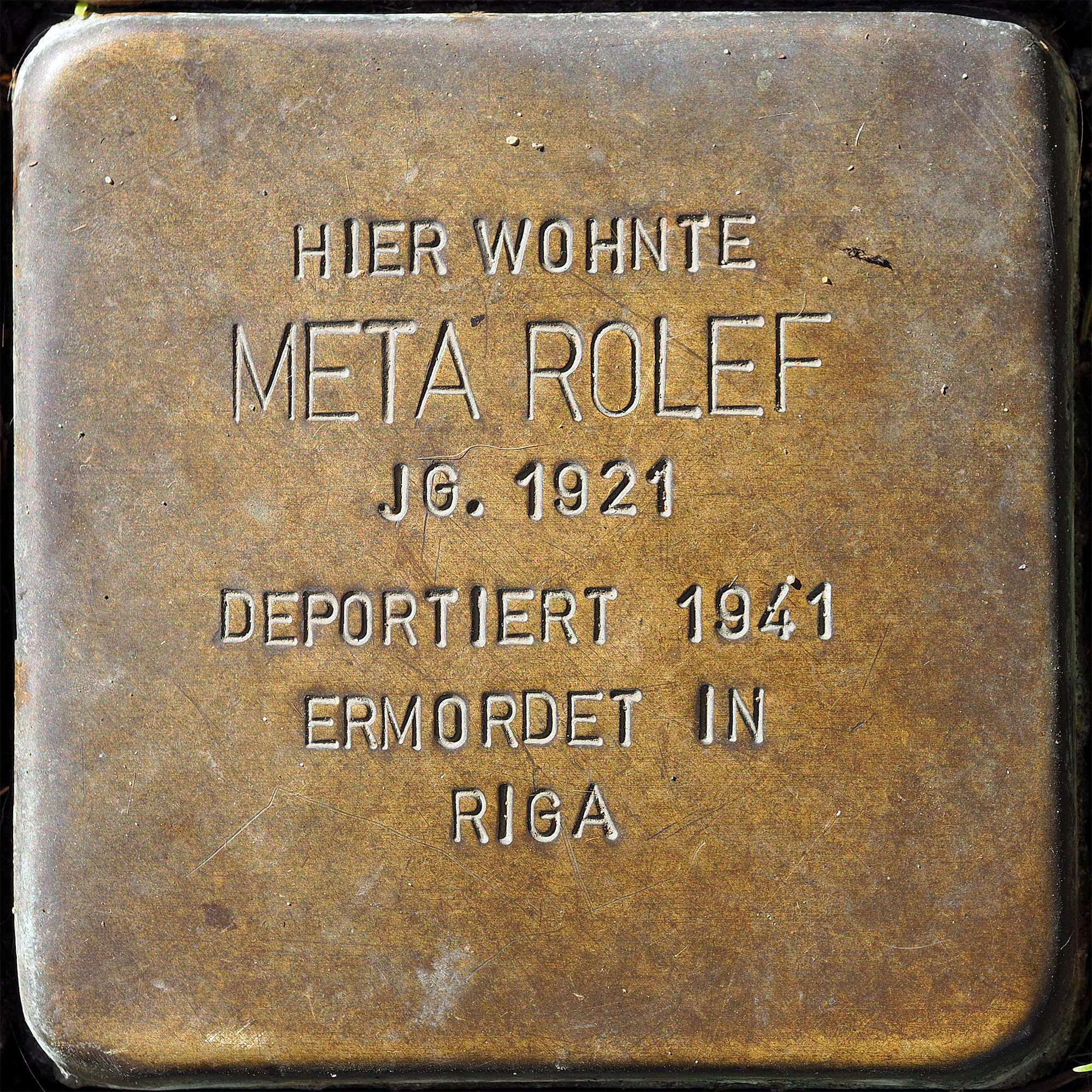 Stolpersteine MG: Rolef, Meta